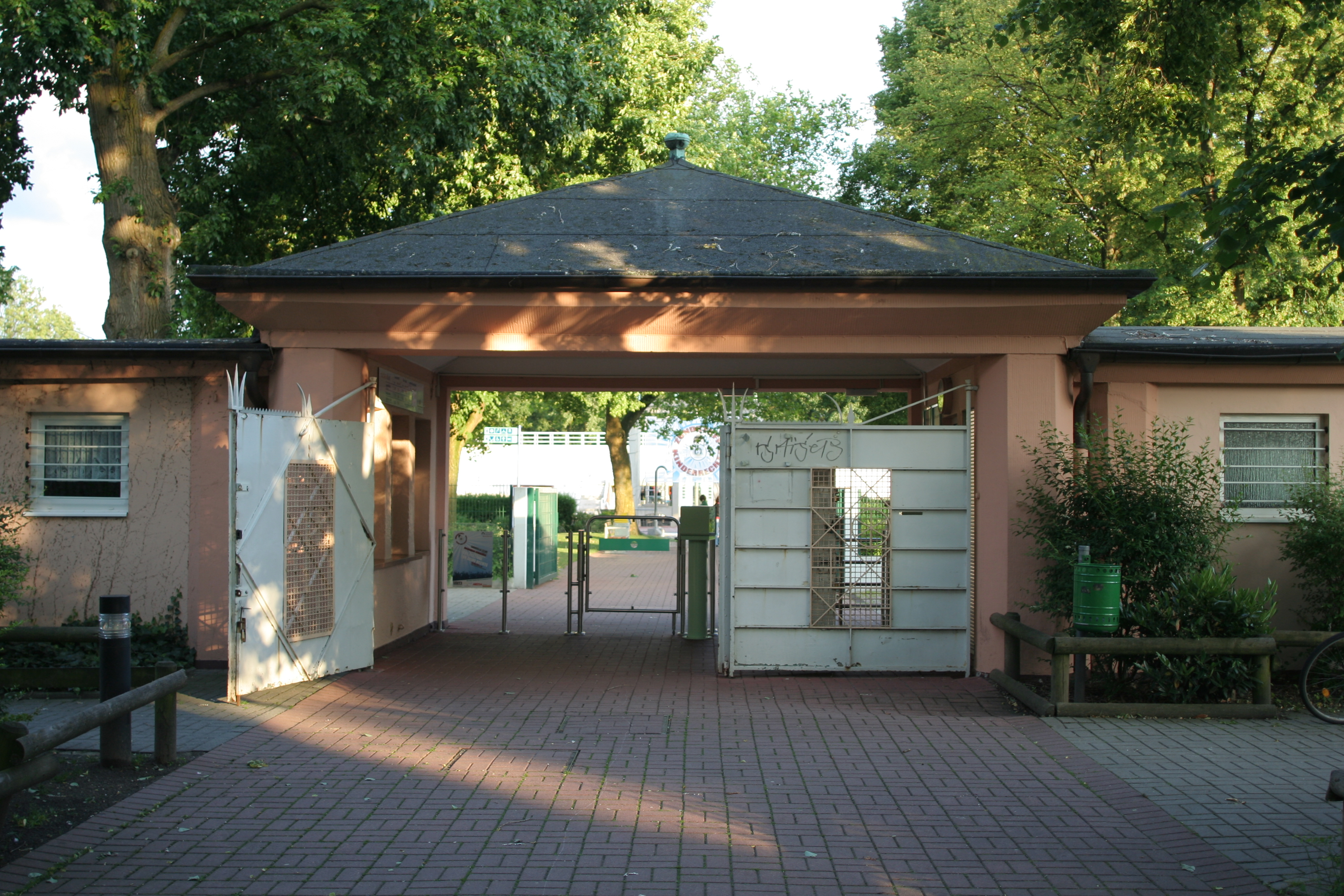 Das Moskaubad in Osnabrück; Eingangsportal